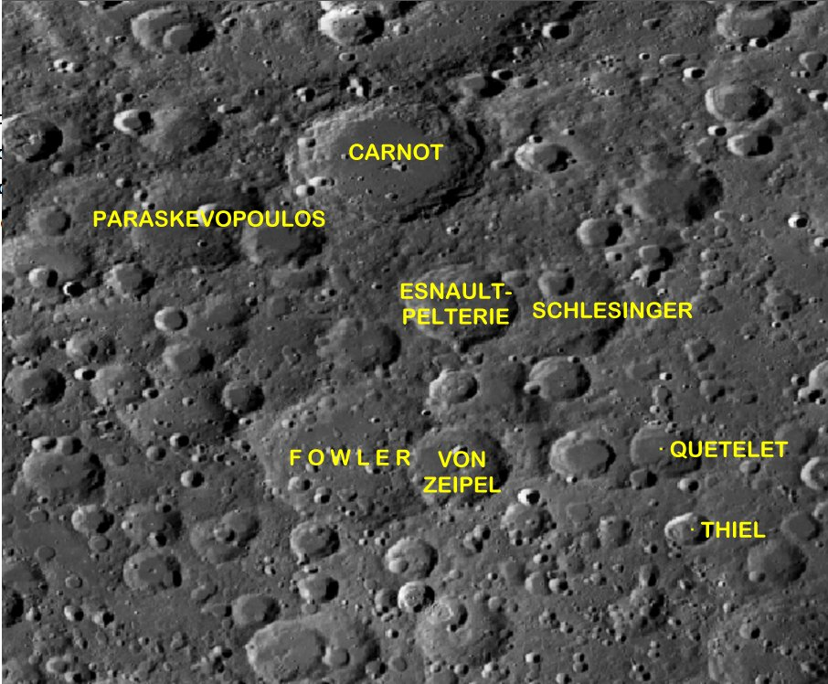 Cráter lunar Esnault-Pelterie. Localización. (Imagen LROC).